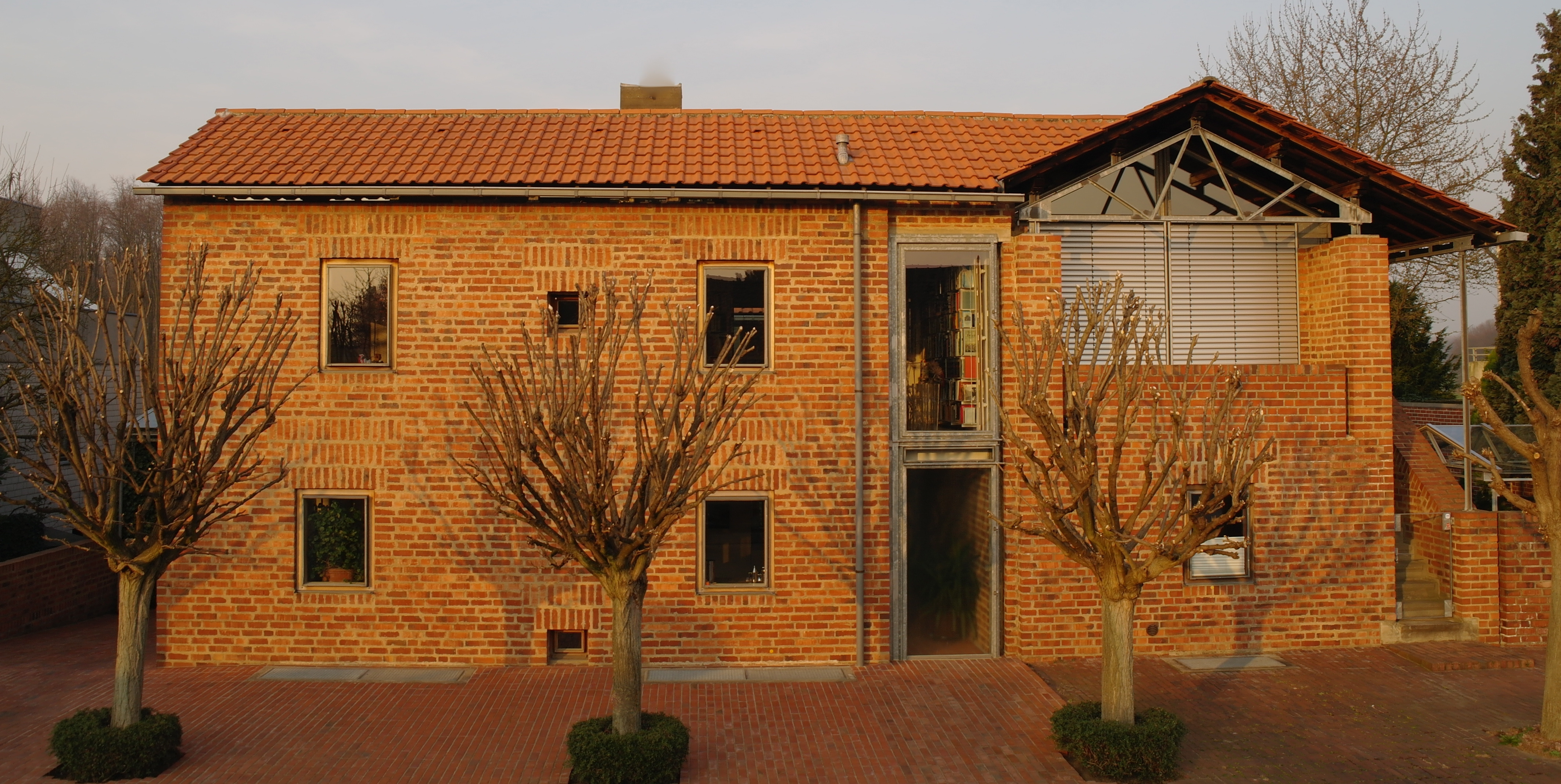 Haus Heinze-Manke. Architekt Heinz Bienefeld. Straßenansicht